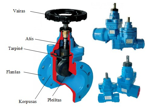 Skląstinės sklendės pjūvis